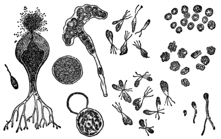 Species: Botrydium granulatum